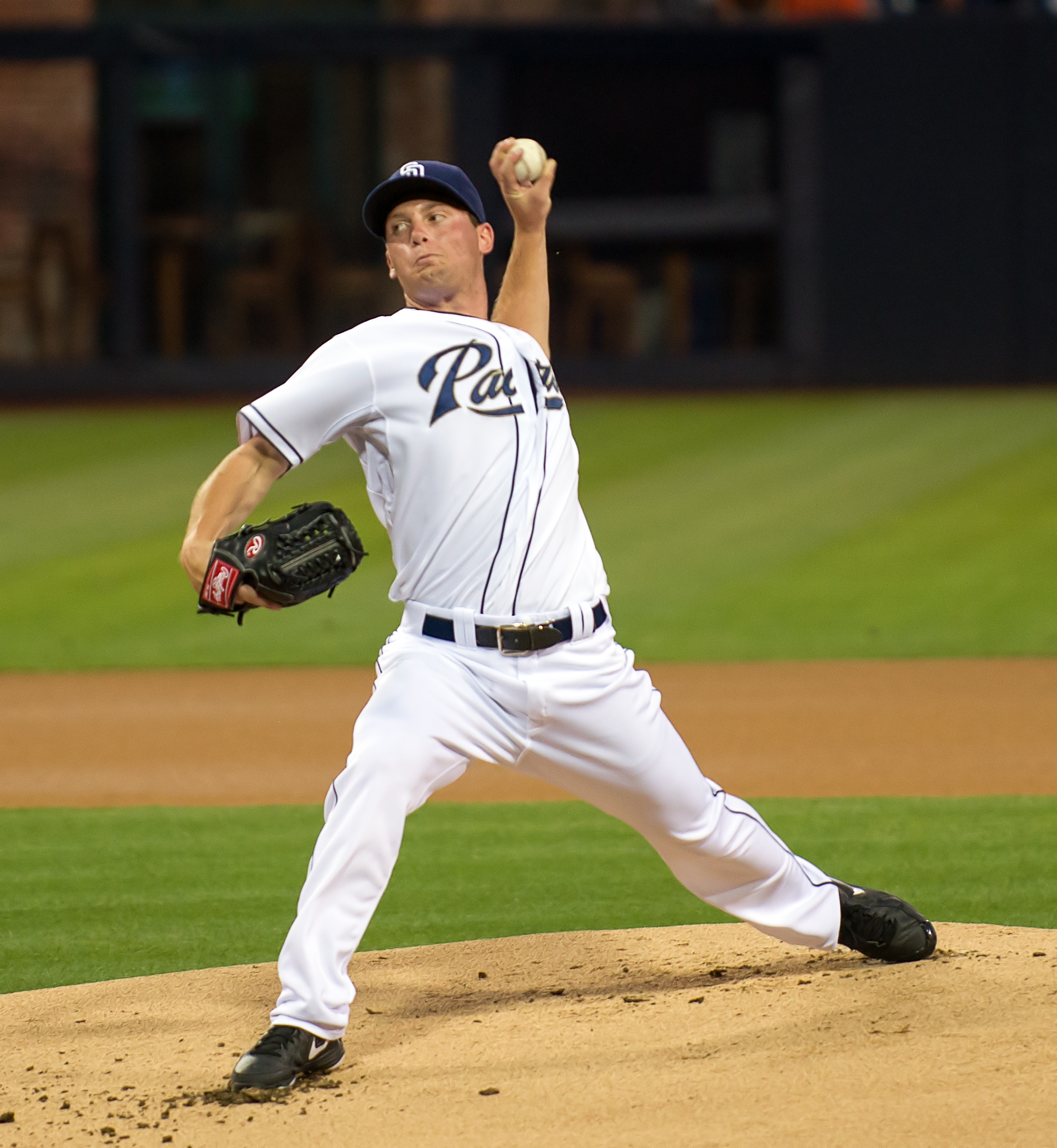 Robbie Erlin